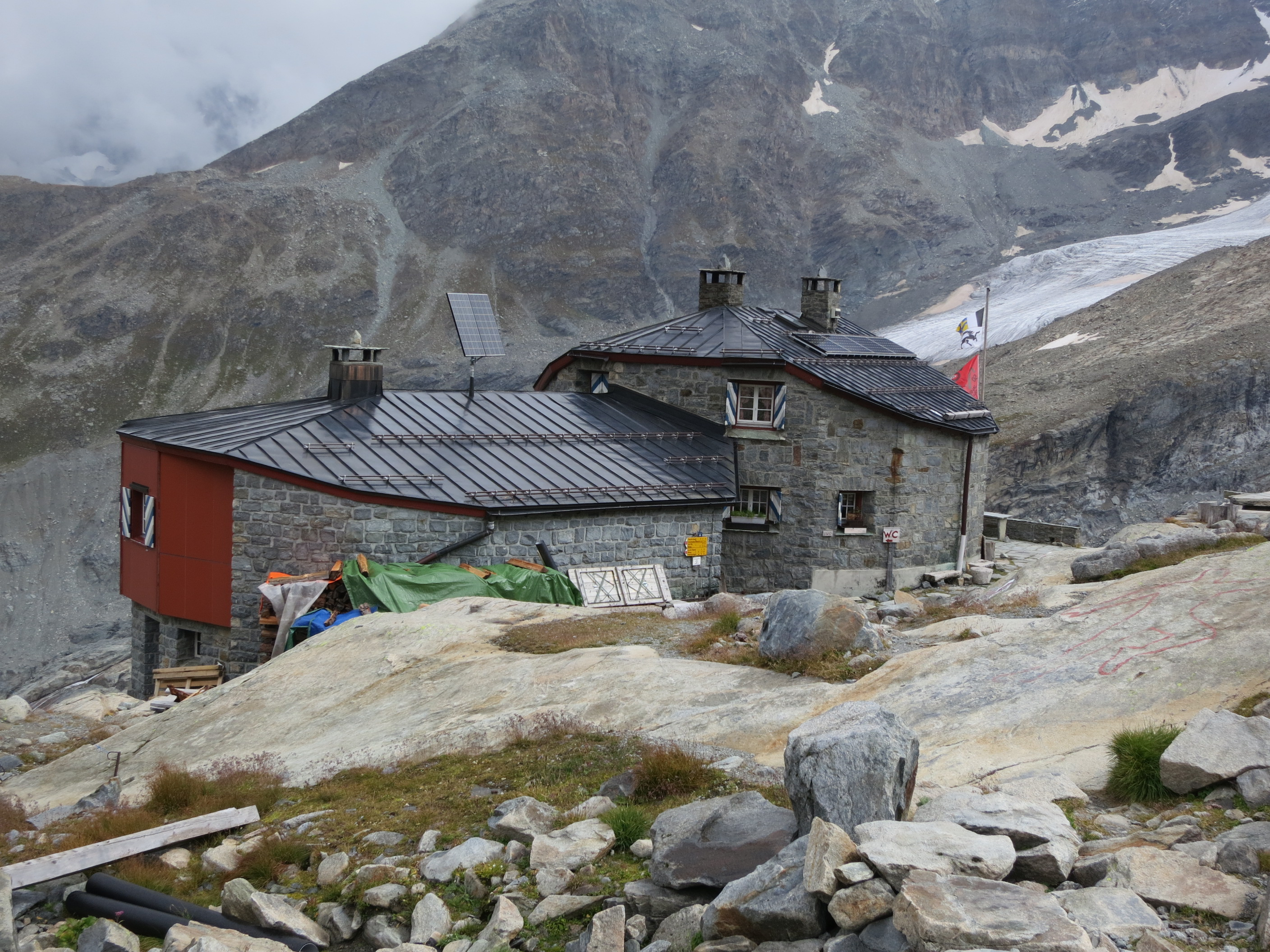 Coazhütte, Val Roseg, Samedan GR, Schweiz